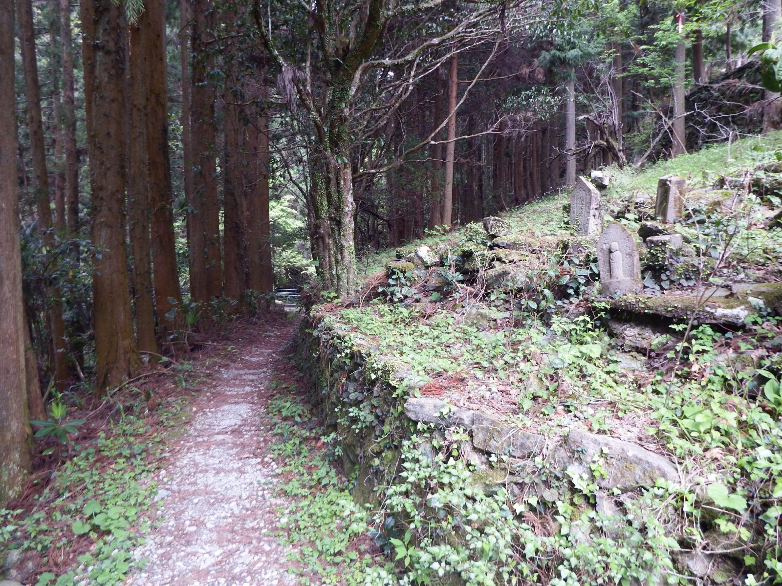 阿波遍路道 焼山寺道